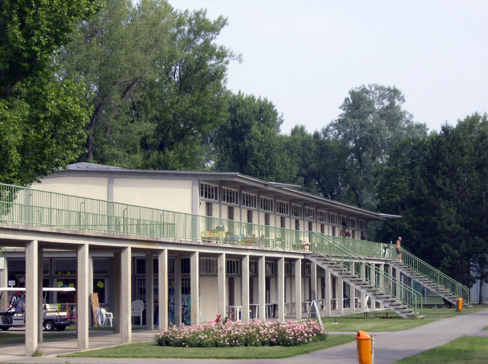 Wien, Badeanstalt Gänsehäufel, Kabinenblock F